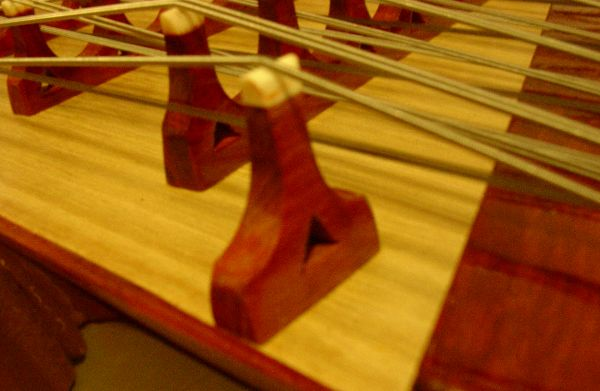 投搞者 Koika 撮影者 同上